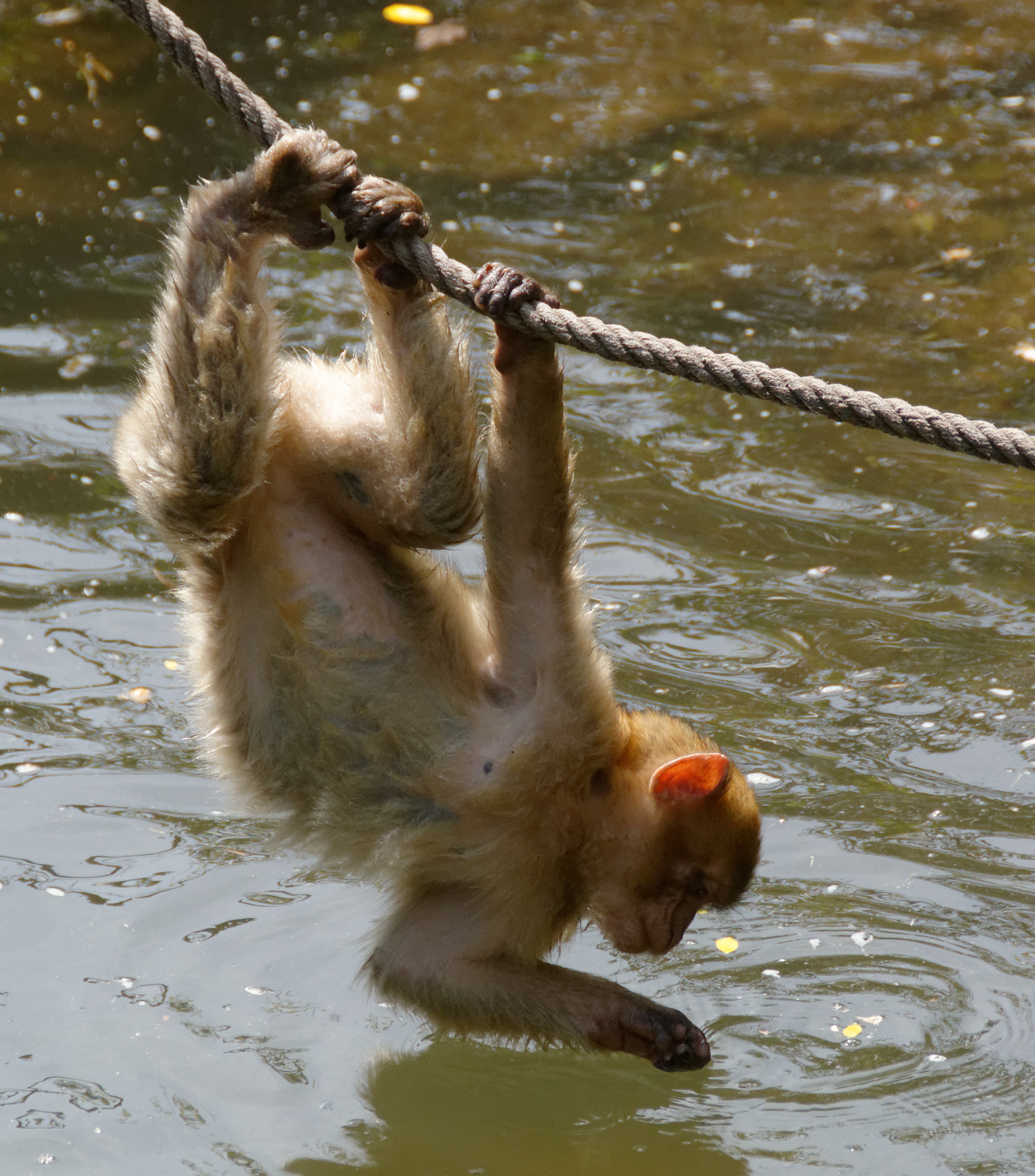 Montagne des singes : Macaque de Barbarie (Macaca sylvanus).